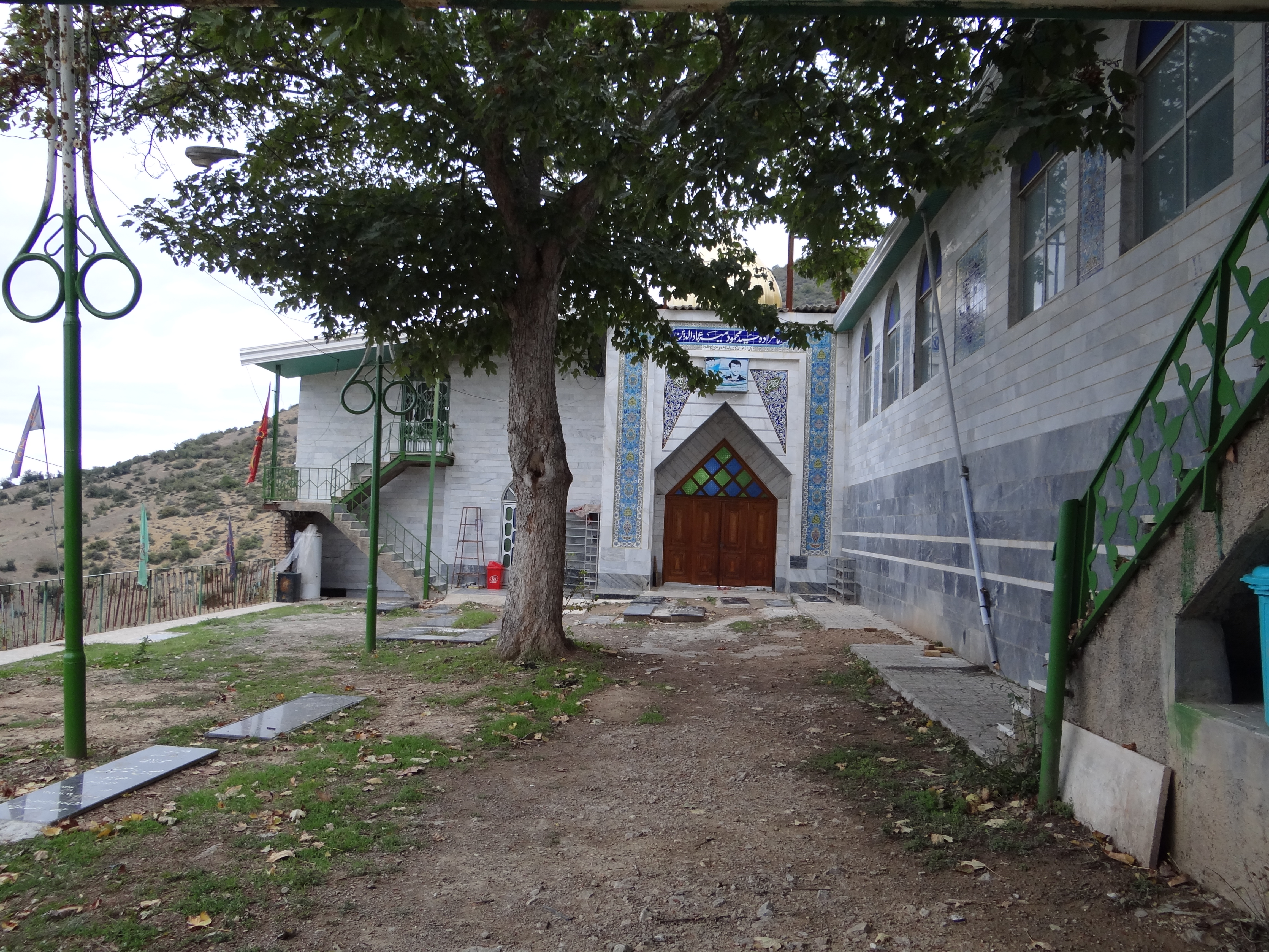 محوطه آرامگاه میرعمادالدین هزارجریبی